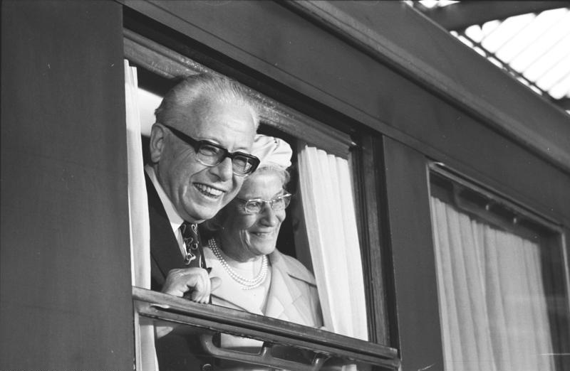 Altbundespräsident bei der Abfahrt nach Essen